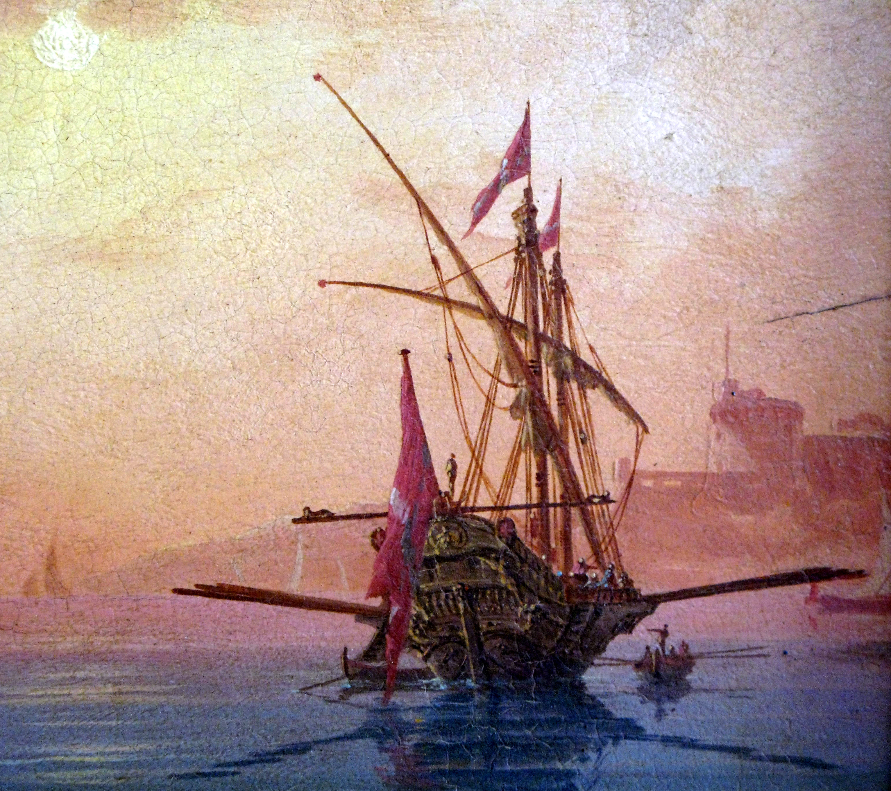 detail